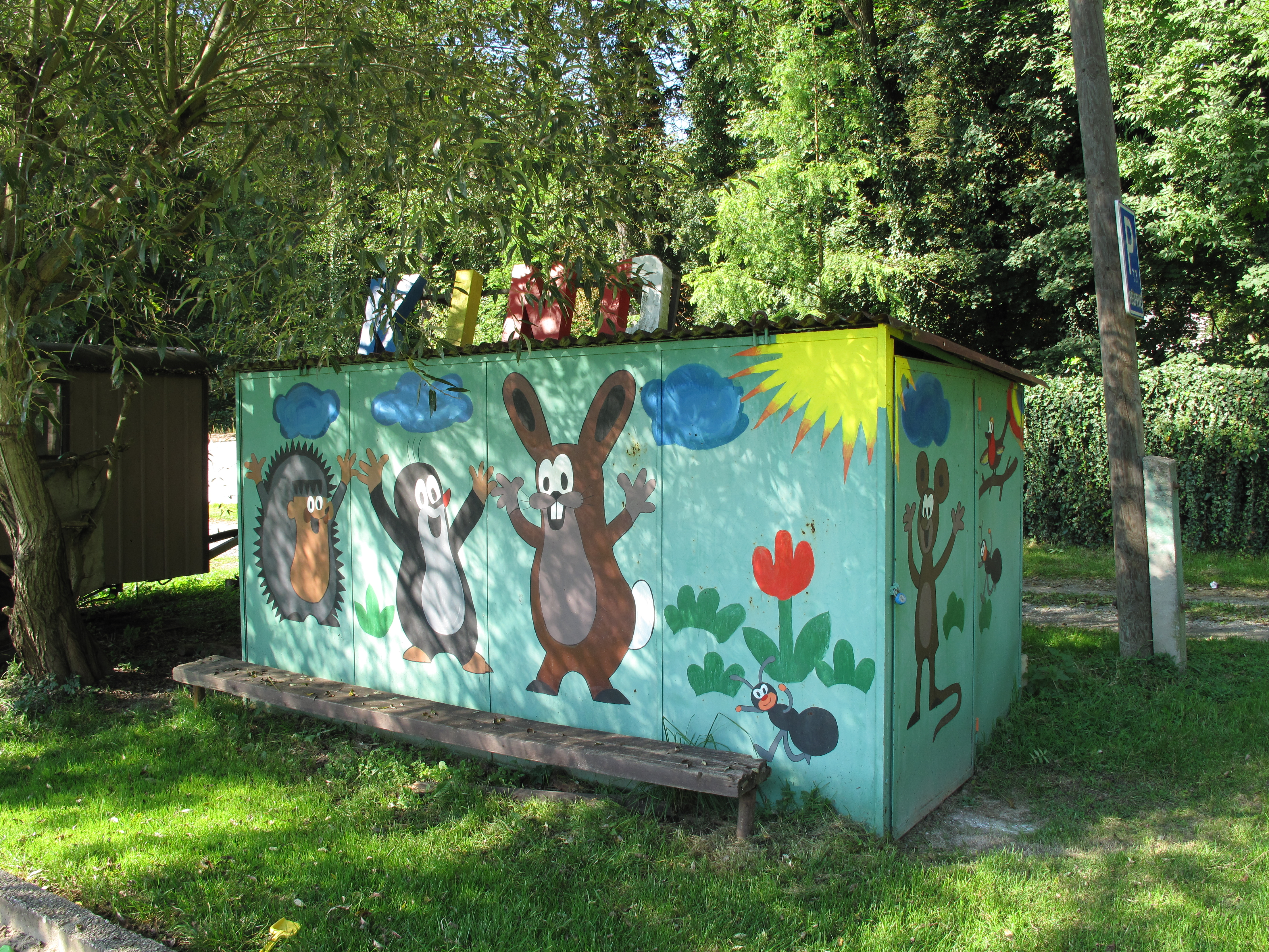 Dětské kino v Jablonné. Okres Benešov, Česká republika.